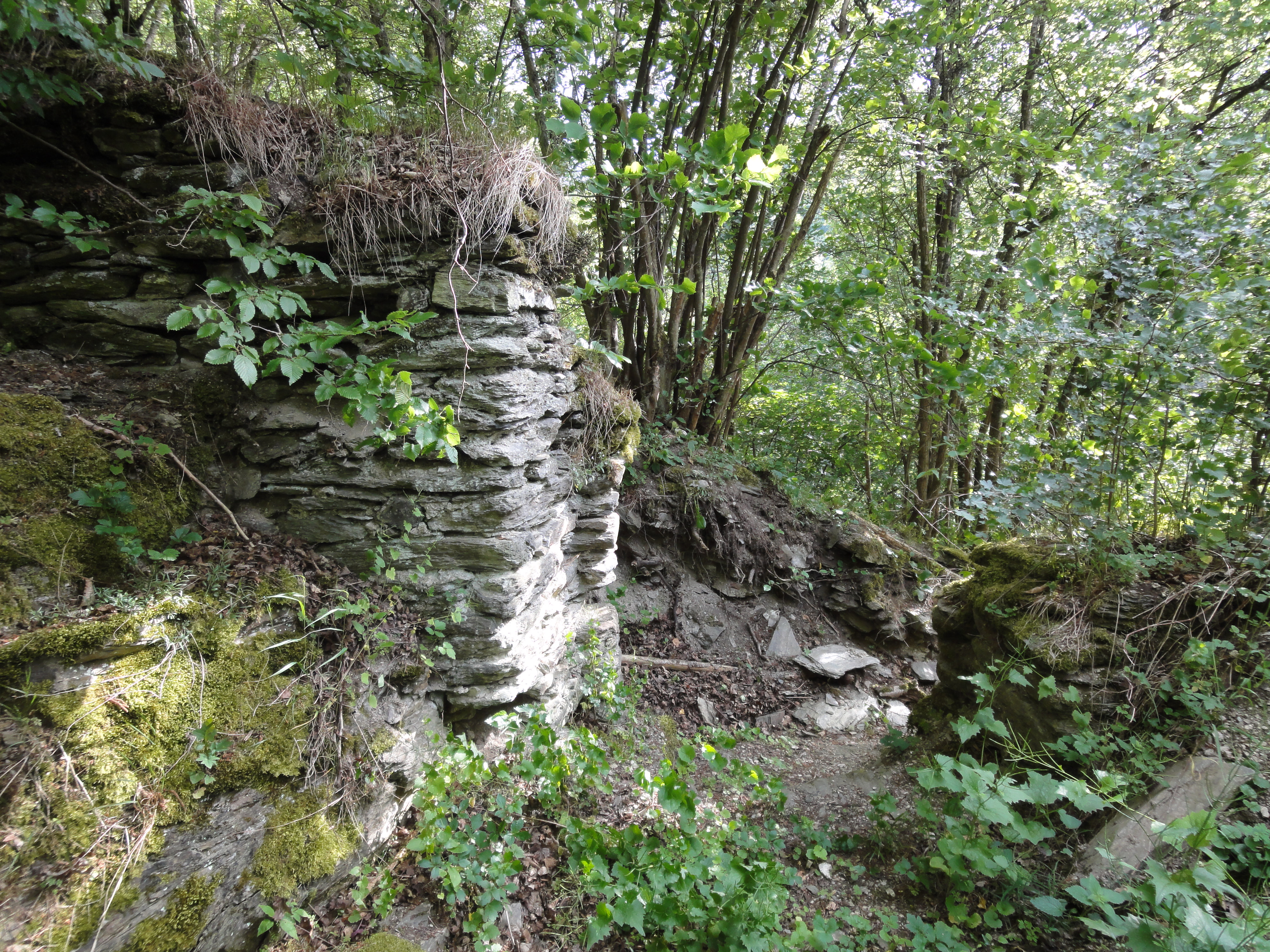 Burg Greifenstein bei Hohenstein - Mauerwerksdurchgang